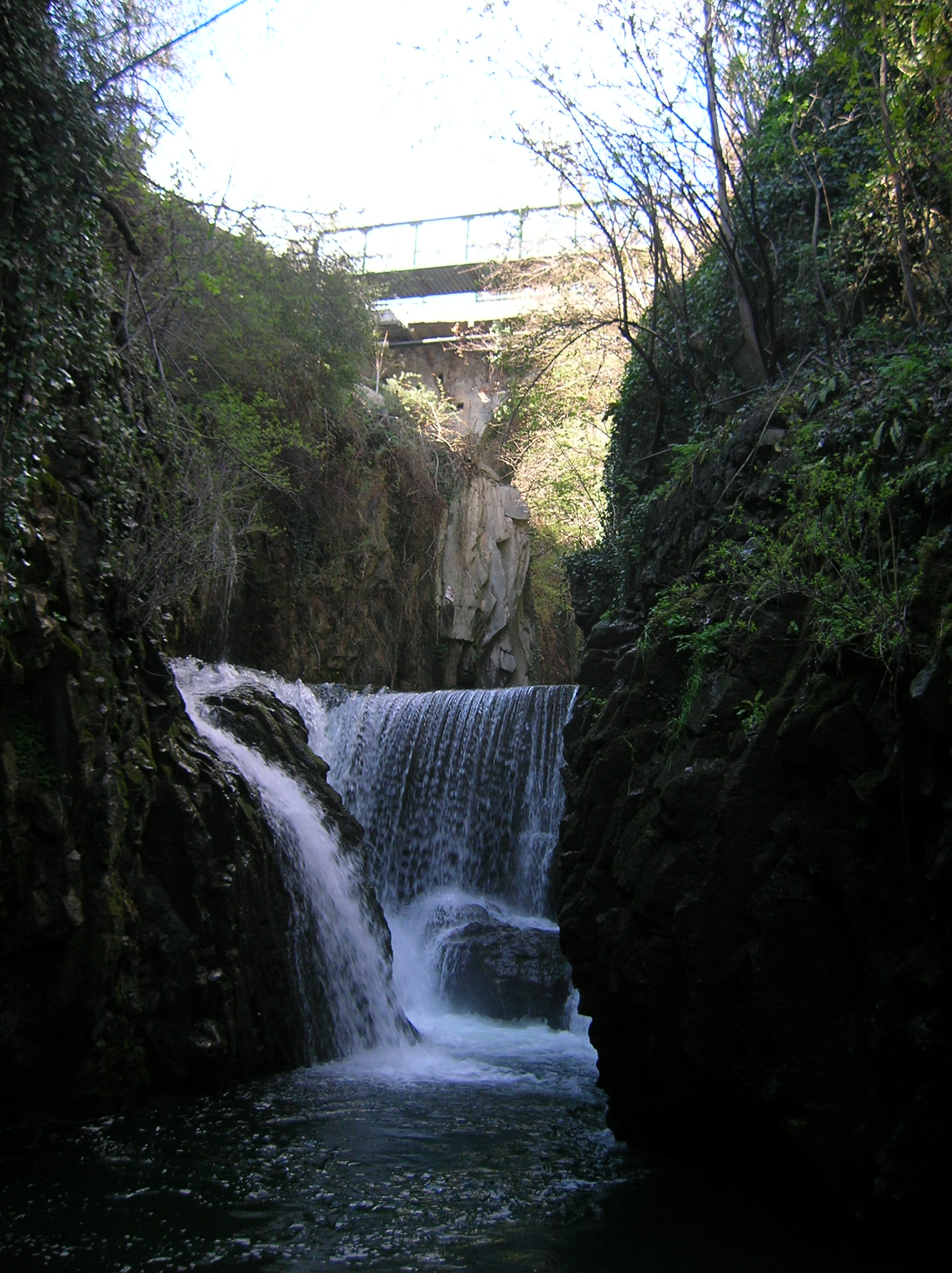 ponte oscuro e passerella del Fili, ad Asso, visti dal fiume a valle